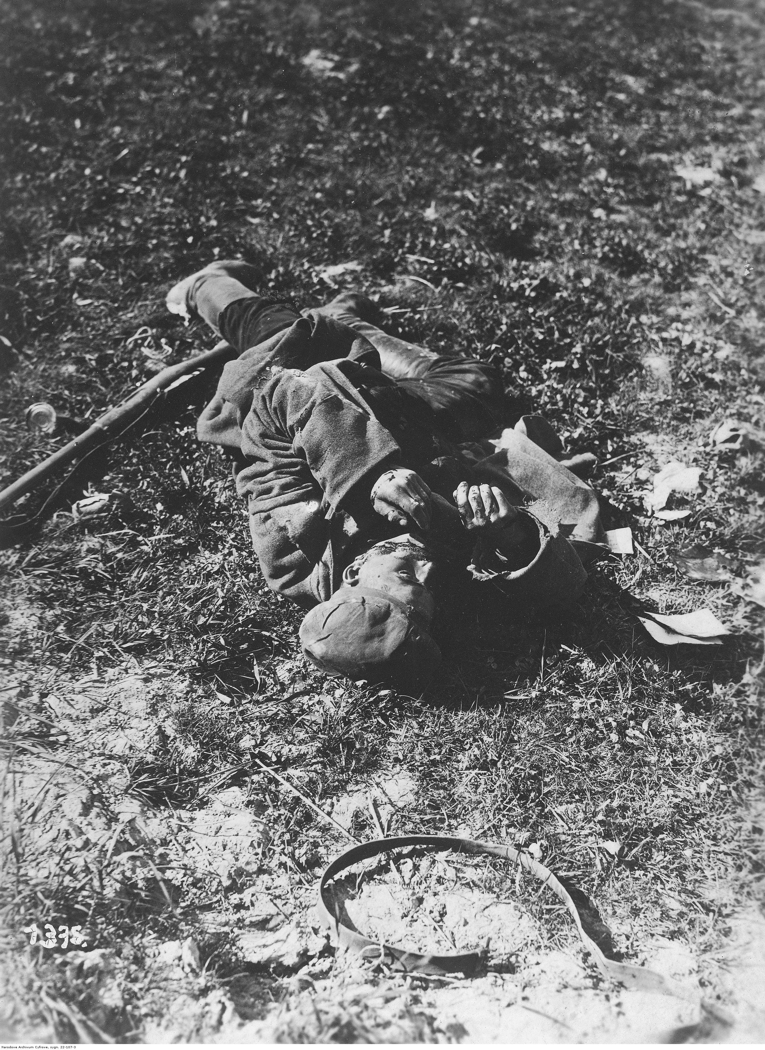 Trup rosyjskiego żołnierza.